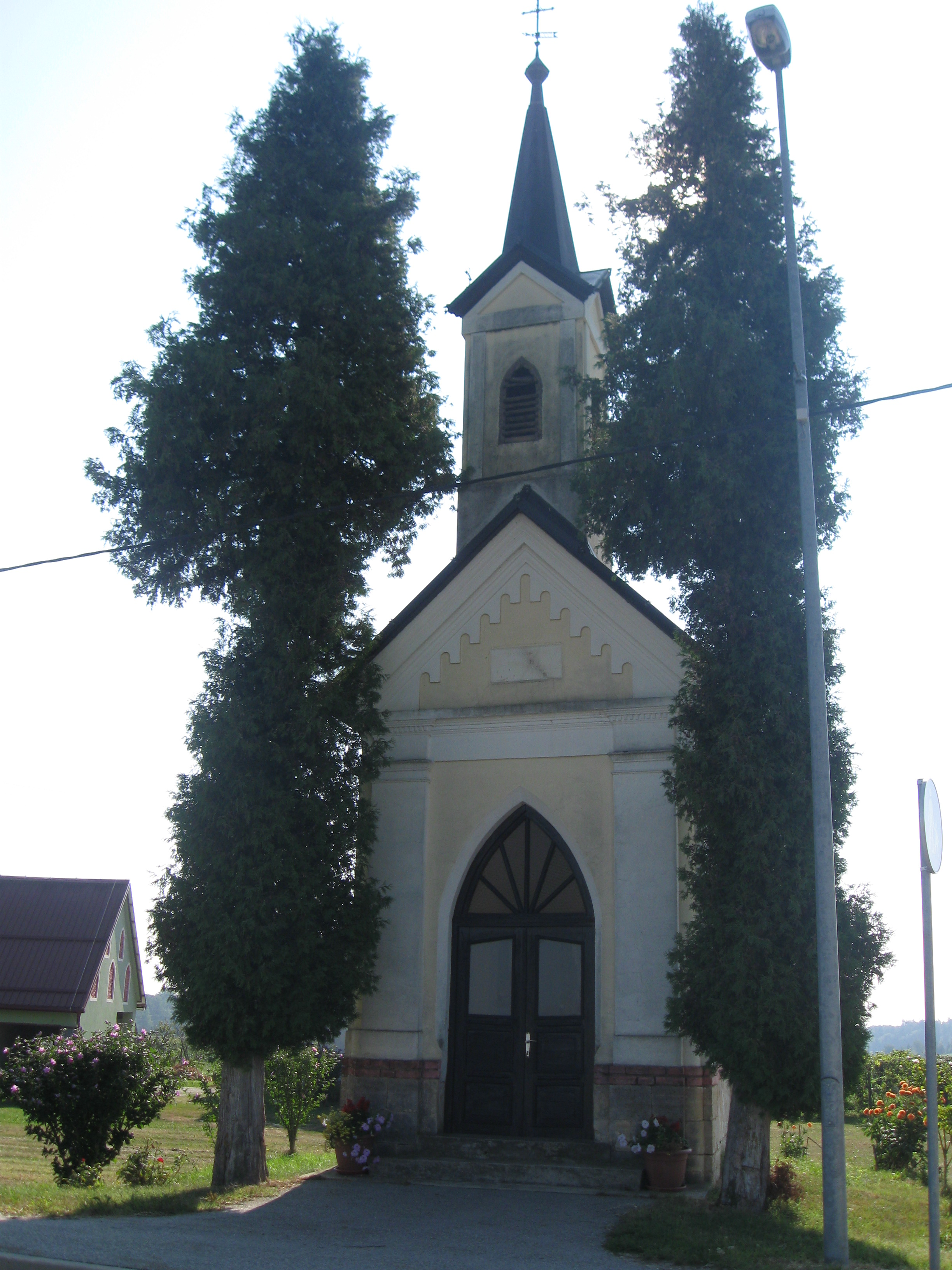 Kapelica z zvonikom iz začetka 20. stoletja, pokriva jo opečna dvokapna streha.